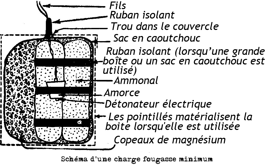 Traduction de Fougasse charge.jpg